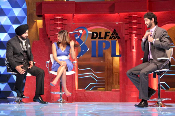 Navjot Singh Siddhu, Shibani Dandekar, Gaurav Kapoor on DLF IPL Extraaa Innings show